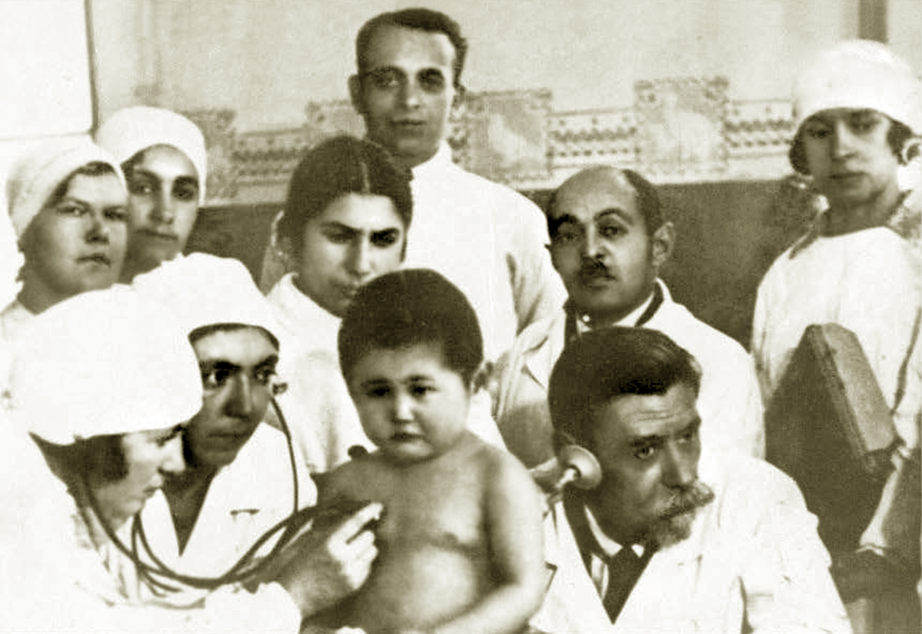 Обход в детской клиники Ленинградского института для усовершенствования врачей профессора Петра Сергеевича Медовикова.